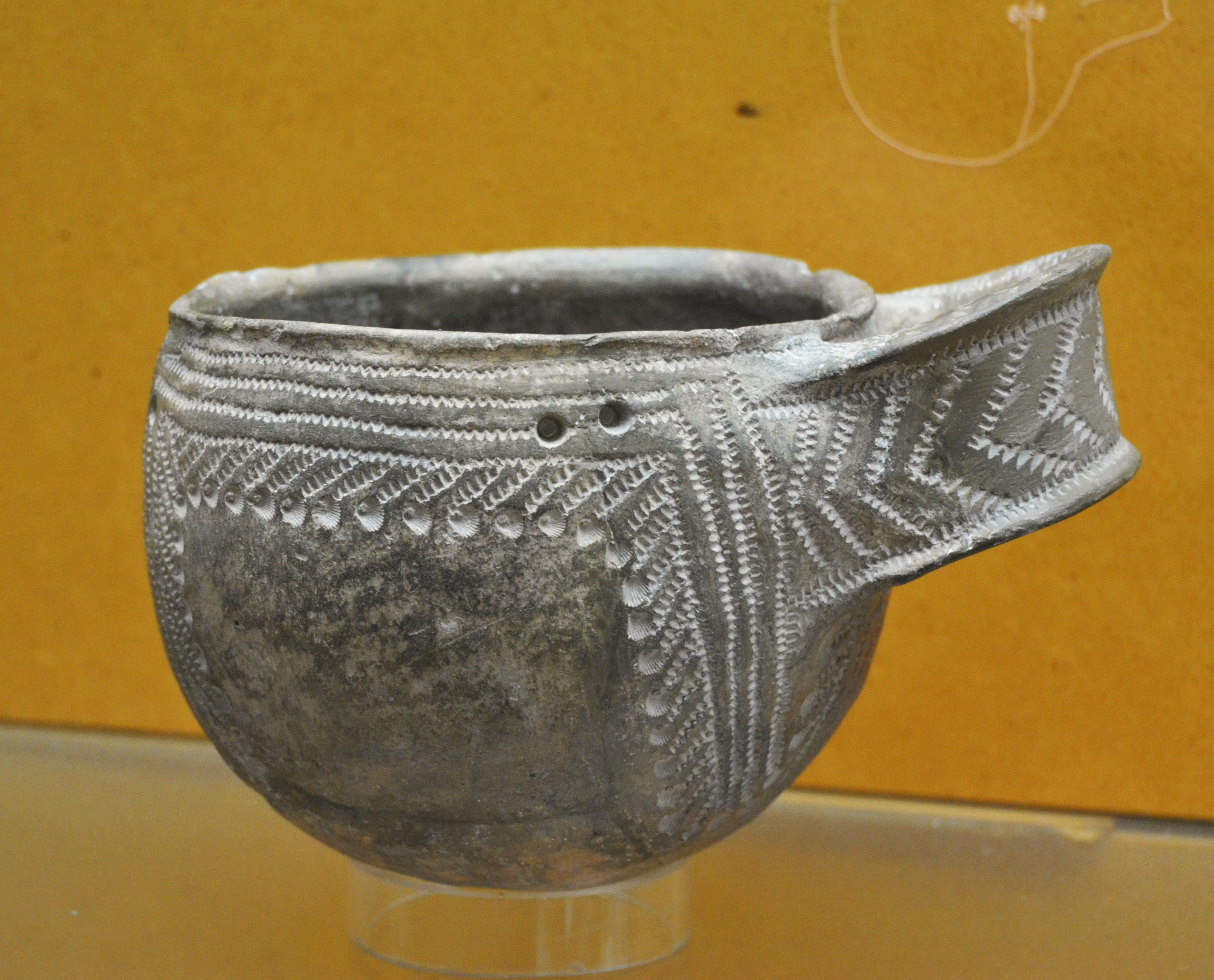 Vas amb decoració impresa cardial, Cova de l'Or de Beniarrés, neolític (5000 - 4200 aC) Museu de Prehistòria de València.